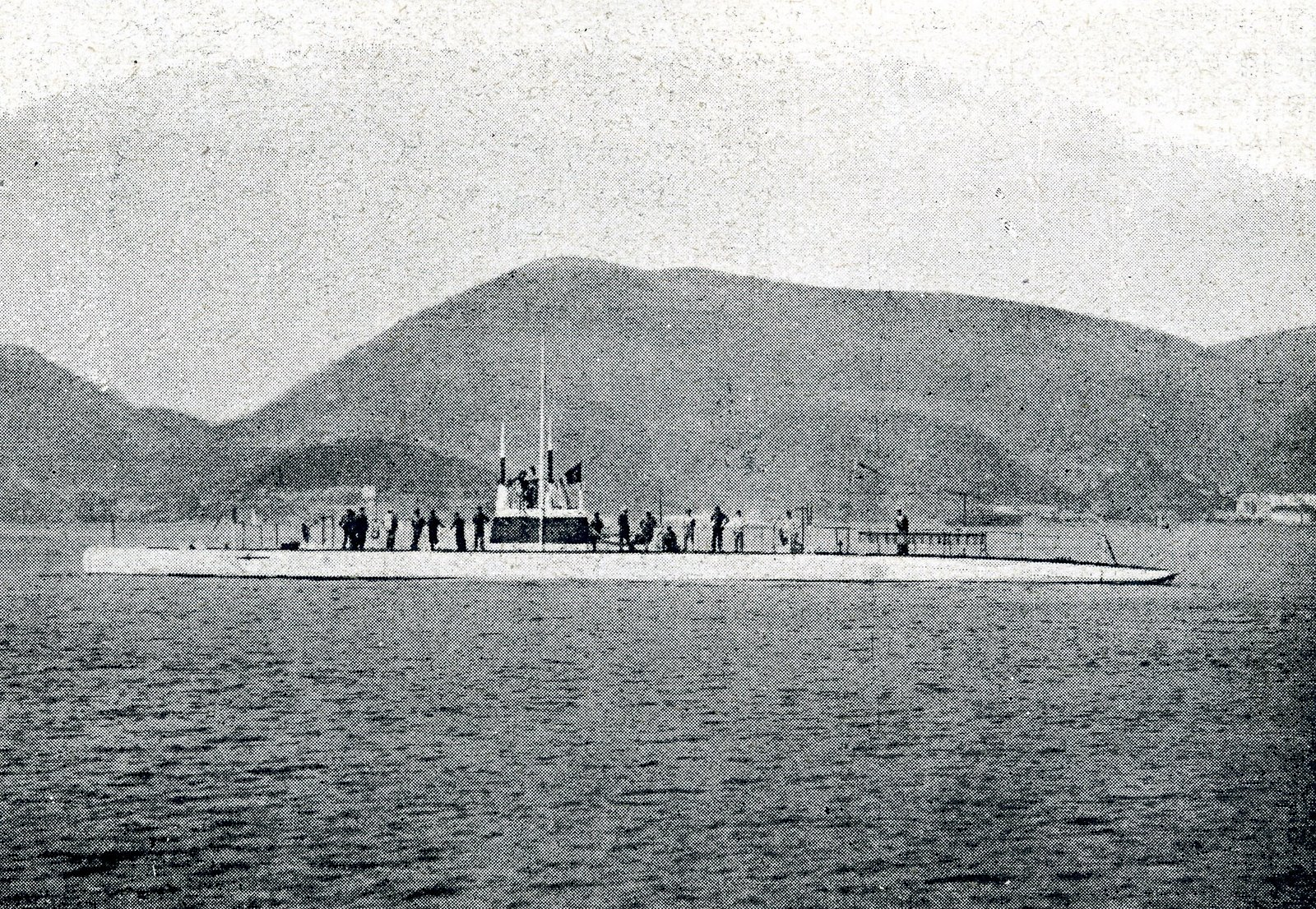 Submarino Armada Española Clase A (clase F Italiana también llamada clase Laurenti) "Cosme García" A-2 1917